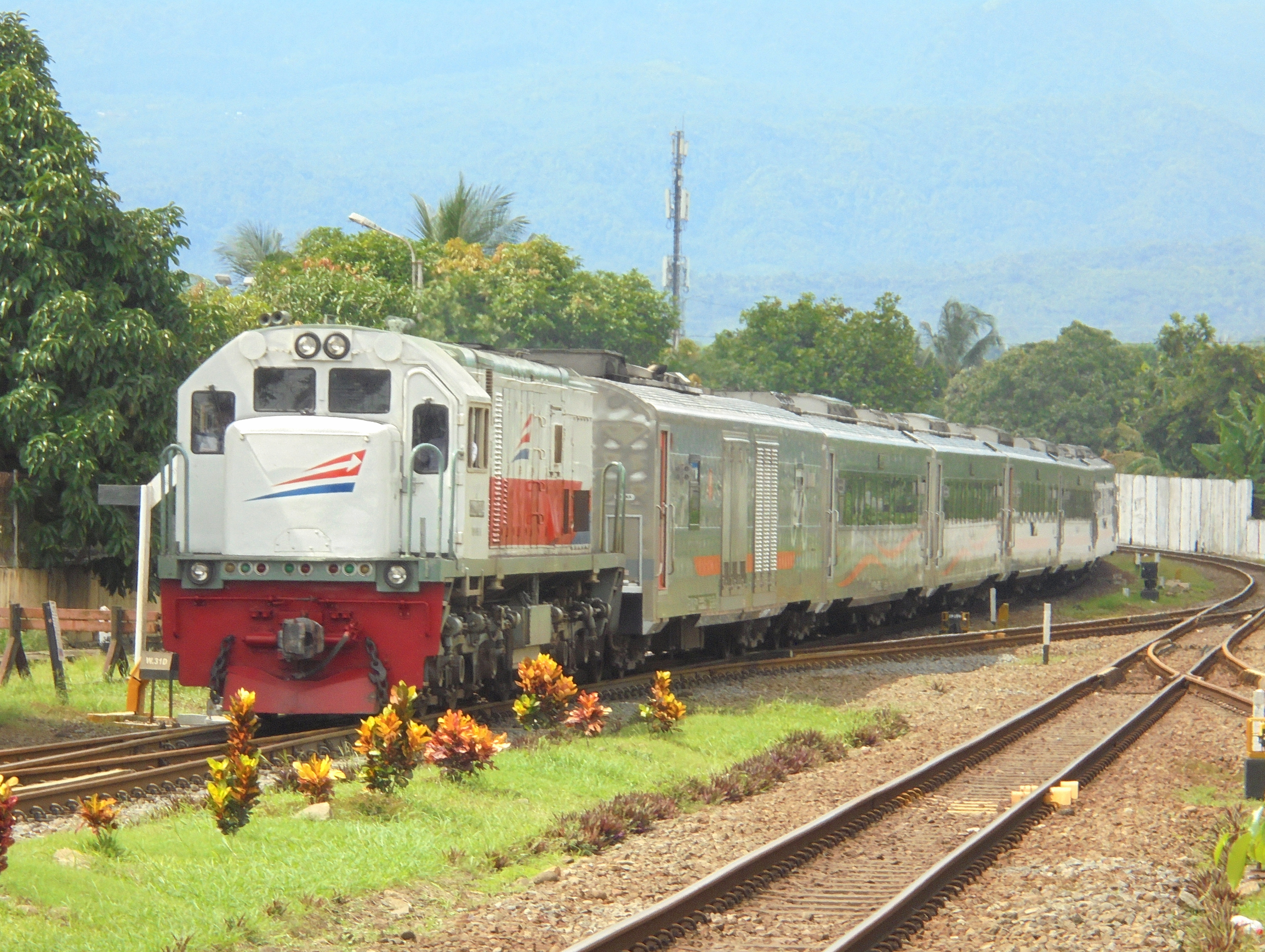 Kereta api Sawunggalih saat memasuki Stasiun Purwokerto